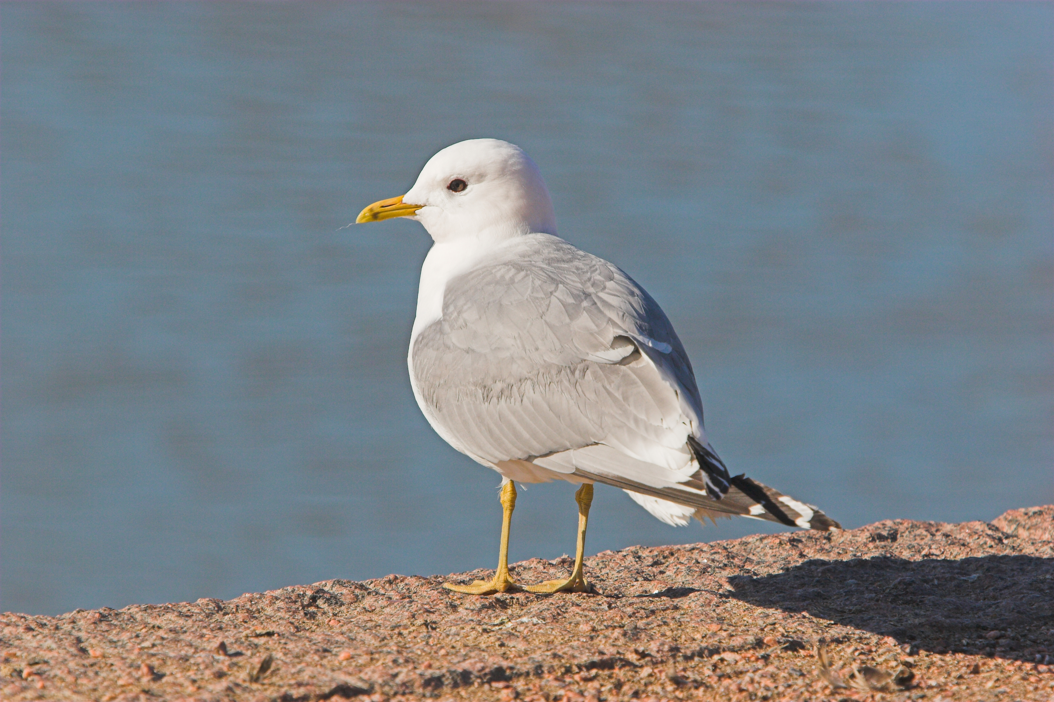 Kalalokki, Larus canus in Finland